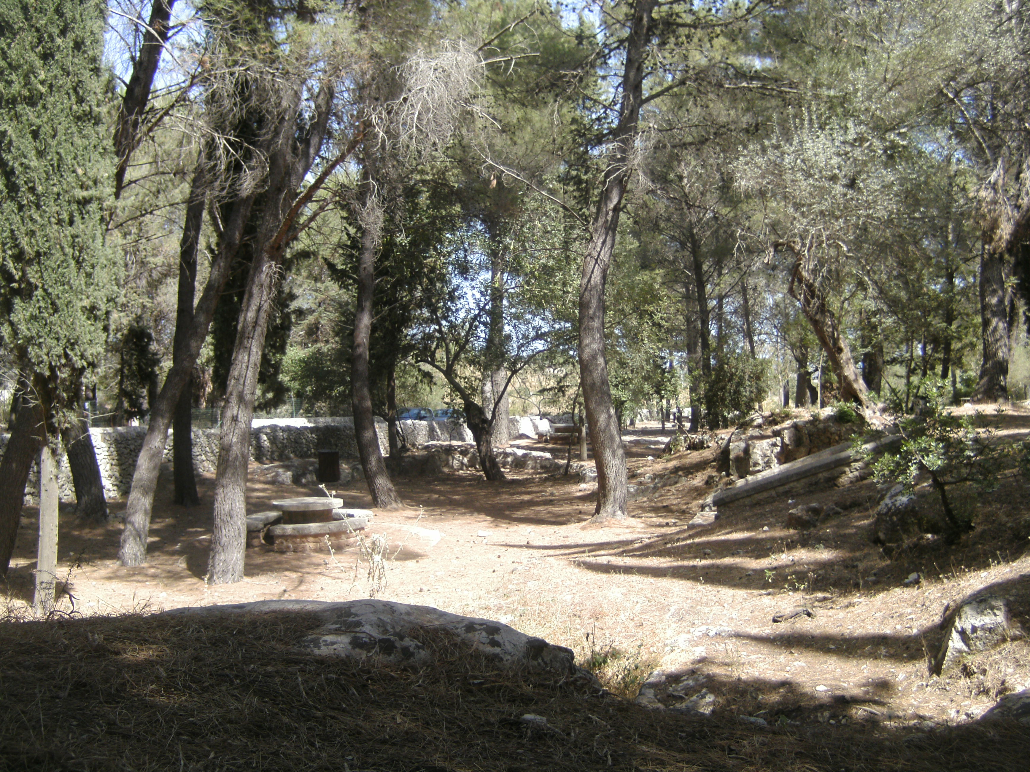 Pineta Madonna della Scala Noto Antica